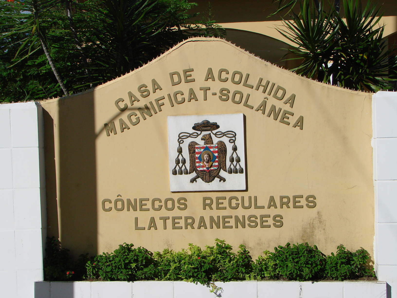 Foto da Casa de Acolhida Magnificat solânea, pertencente a Ordem dos Conegos Regulares Lateranenses.